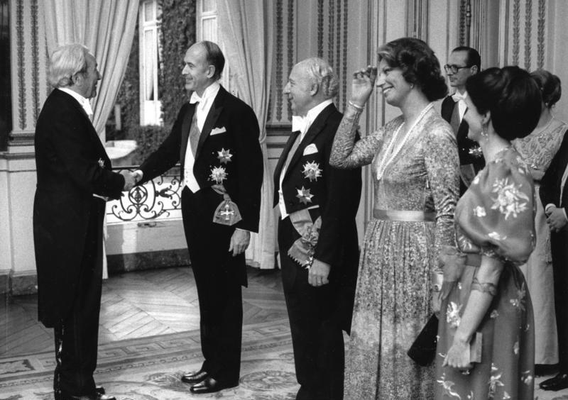 Vom 21. bis 24. April 1975 hielt sich Bundespräsident Walter Scheel zu einem offiziellen Besuch in Frankreich auf. Im Bild: Abendempfang im Elysee-Palast von links: Prof. Carlo Schmid, Präsident Giscard d'Estaing, Bundespräsident Walter Scheel, Frau Dr. Mildred Scheel